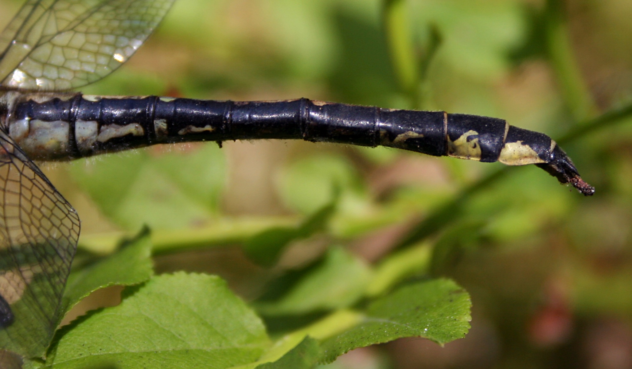 Park Narodowy Bory Tucholskie, odwłok gadziogłówki pospolitej